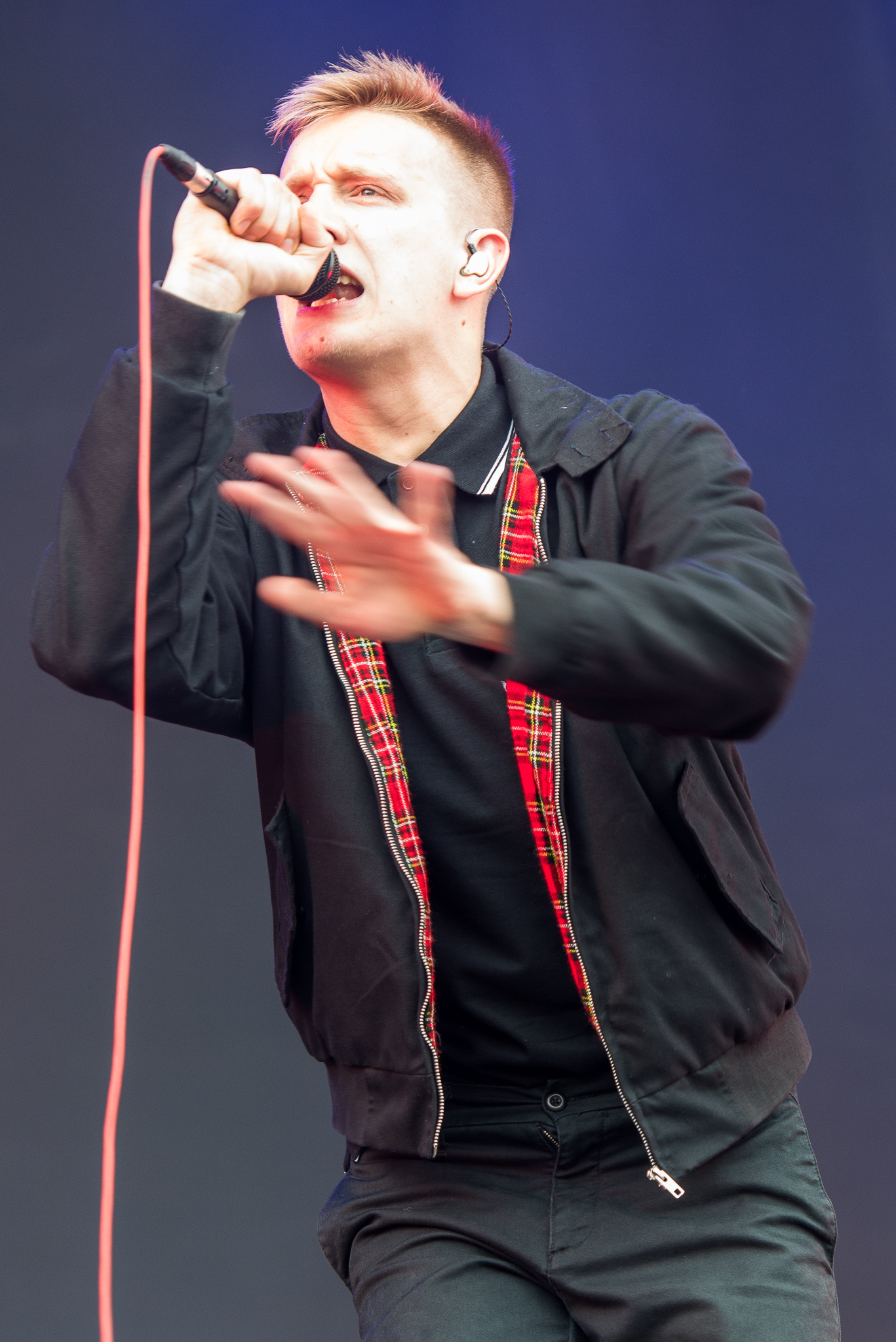 ARGO-Konzerte,Felix Brummer,Festival,Konzert,Kraftklub,Livekonzert,Livemusik,Musik,RiP,Rock im Park 2015,Seat Zeppelin Stage